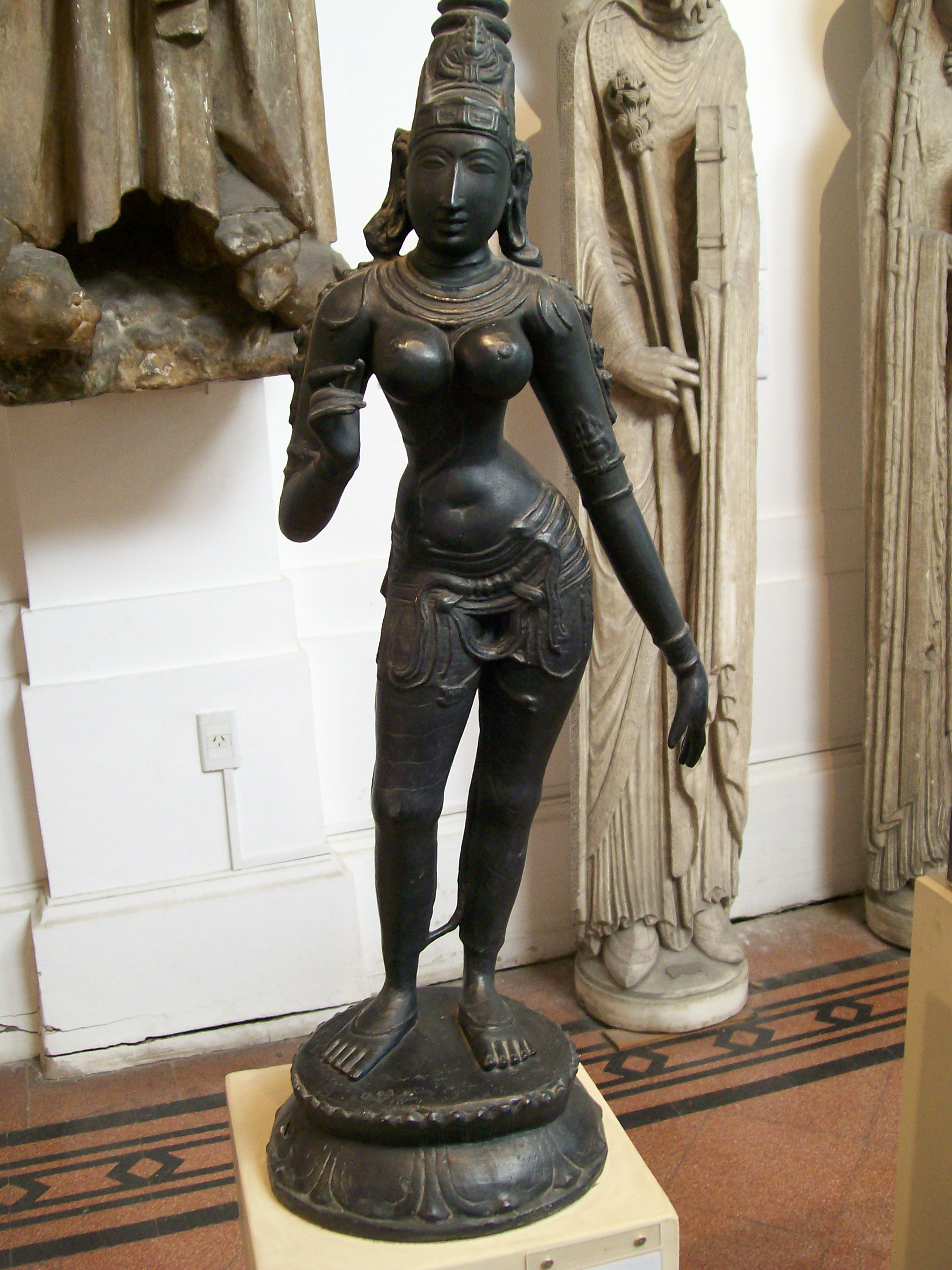 Museo de Calcos, Costanera Sur, Buenos Aires.